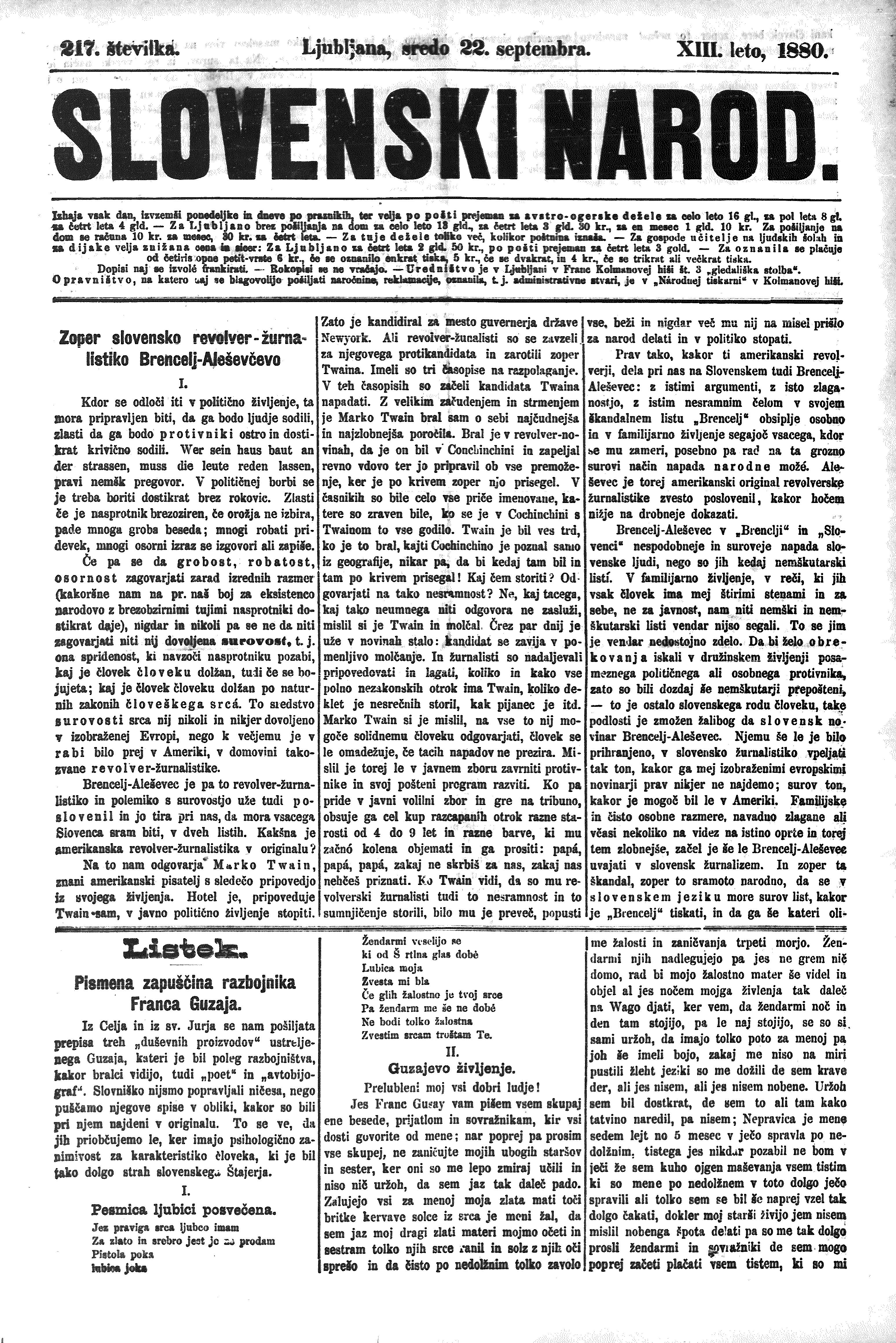 Naslovnica številke časopisa Slovenski narod iz leta 1880, z dne 22. septembra. Skenirana naslovnica se nahaja v Narodni in univerzitetni knjižnici.